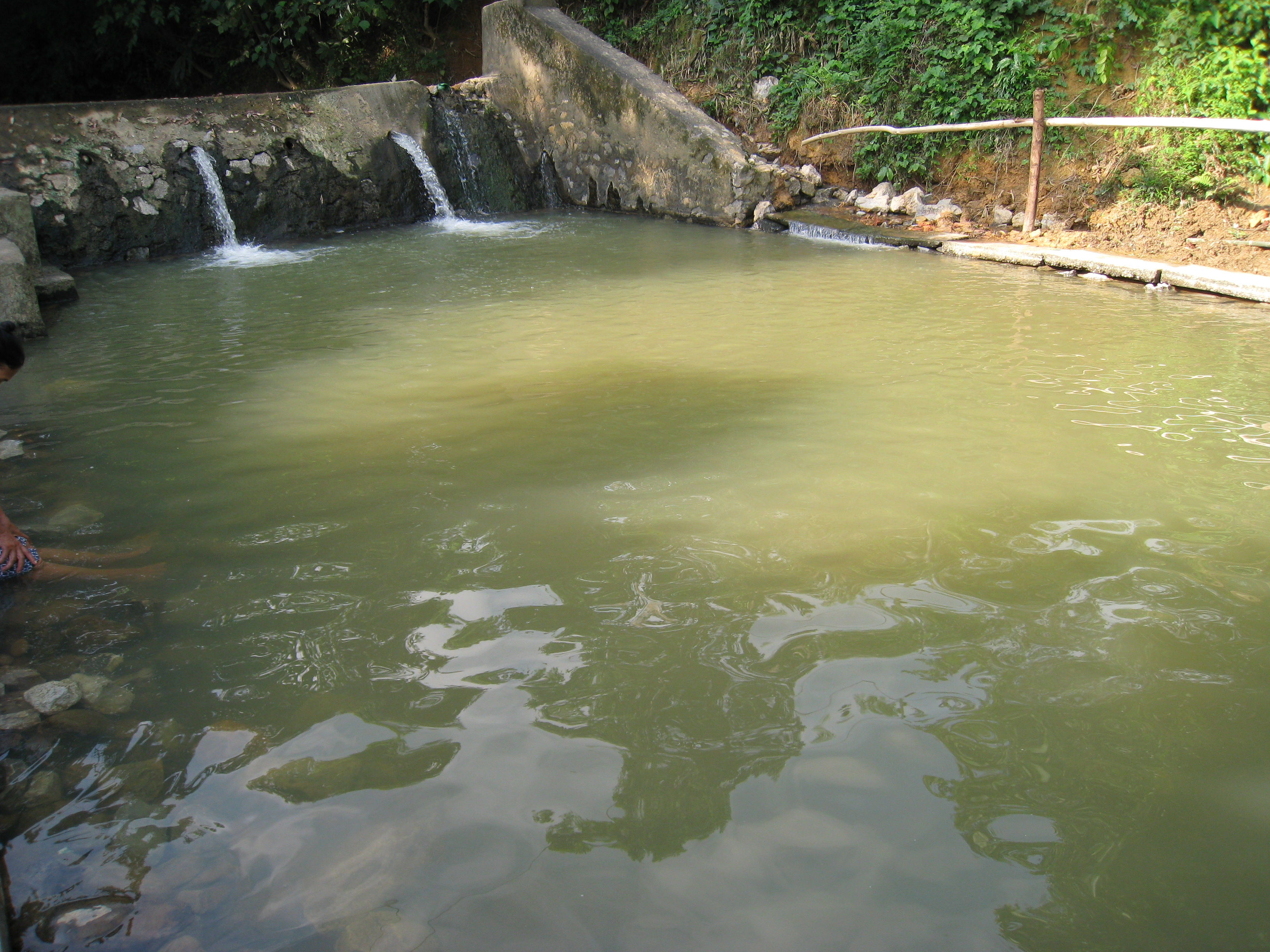 Bang Spa in Quang Binh, Vietnam